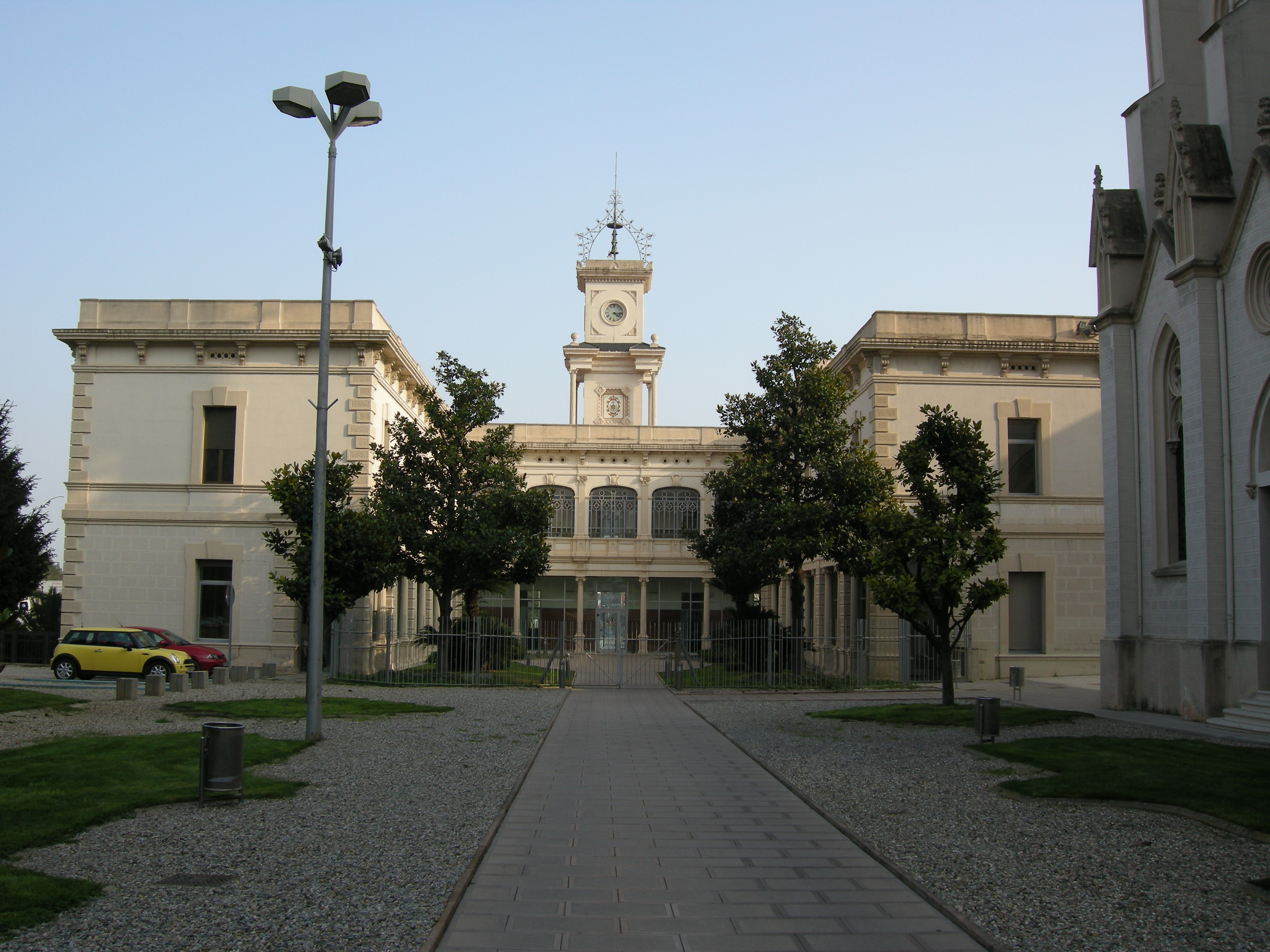 Seu de la Cúria Provincial, al carrer dr. Antoni Pujadas. Sant Boi de Llobregat